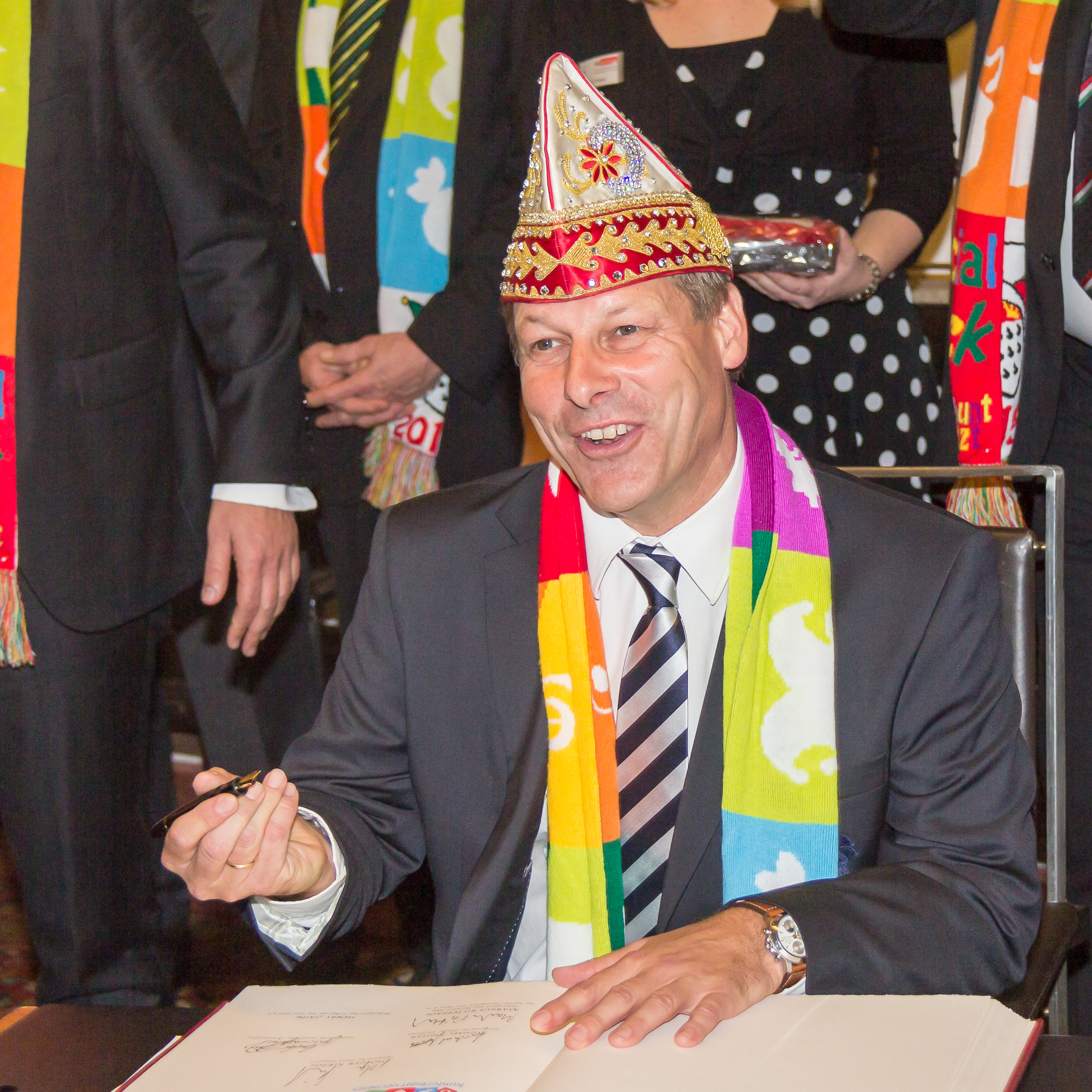 Kölner Dreigestirn vom Flittarder KG von 1934 e.V. Vertragsunterzeichnung des Sessionsvertrages im Senatssaal und Empfang durch den Oberbürgermeister im Hansasaal des Historischen Rathauses von Köln Foto: Markus Ritterbach (Präsident Festkomitee Kölner Karneval) trägt sich in das Gästebuch der Stadt Köln ein